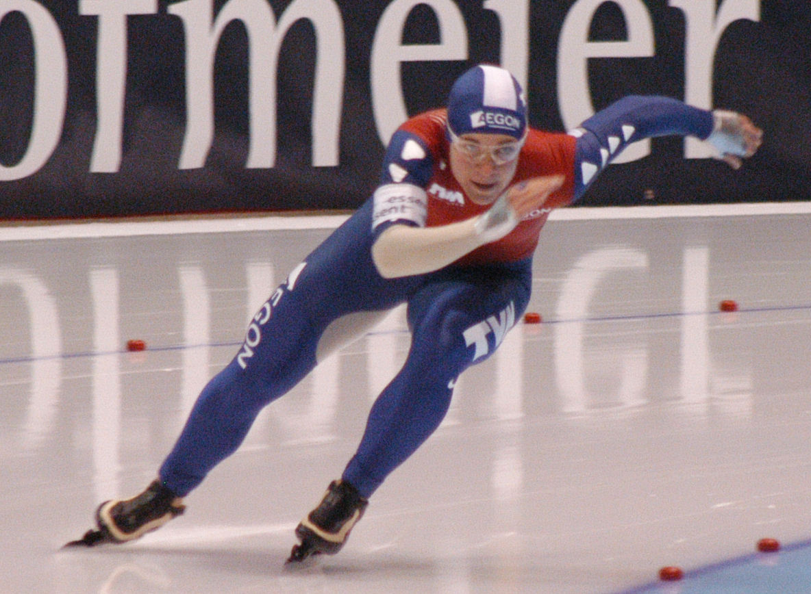 Paulien van Deutekom (NED) in action at a World Cup Speedskating in Heerenveen, the Netherlands.